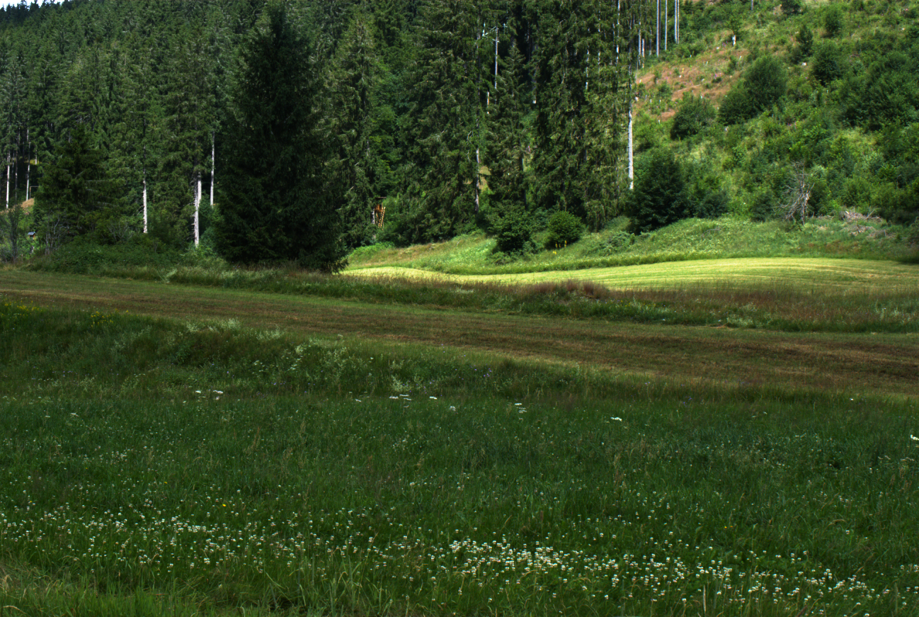 NSG „Ursee“ im Landkreis Breisgau-Hochschwarzwald; Urseetal – Wiesen, Wald und Sturmflächen